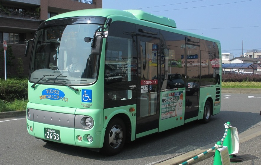 新宮町コミュニティバスの車両